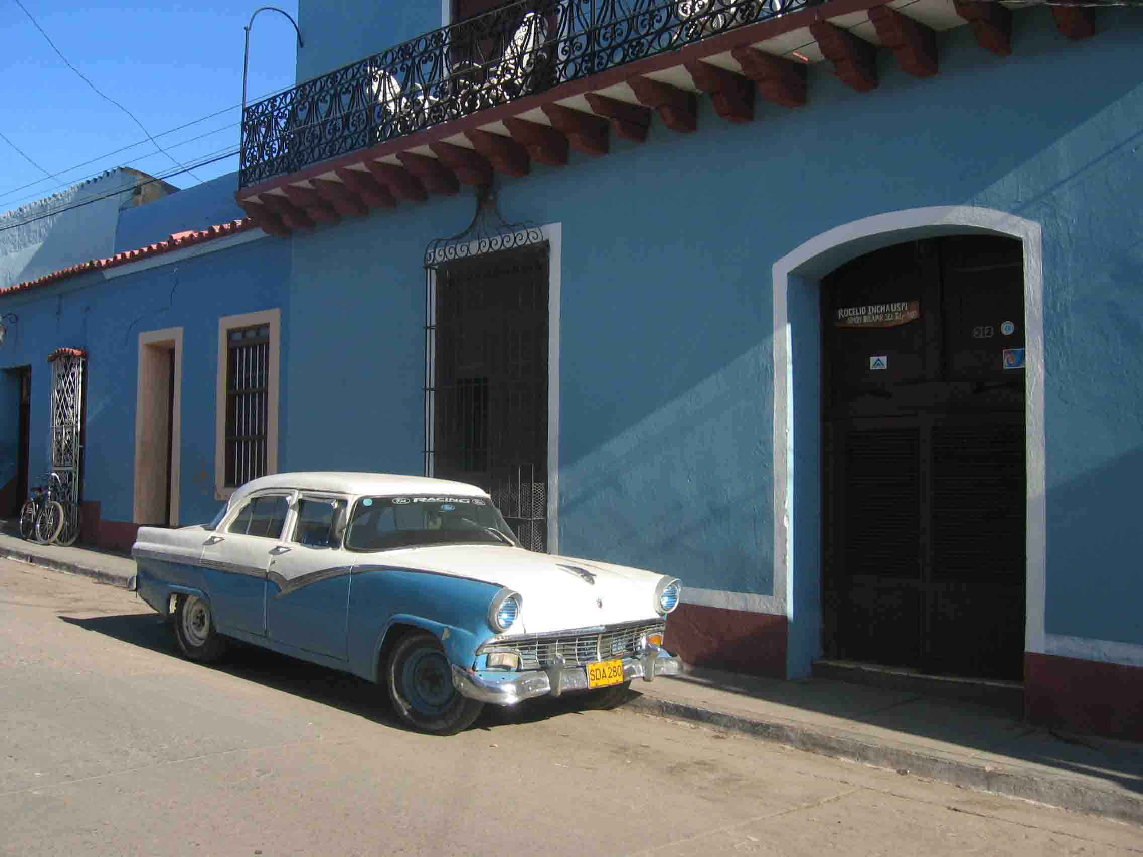 A 'maquina' or 'yank tank' in Trinidad, Cuba, 4 January 2004. (1956 Ford)